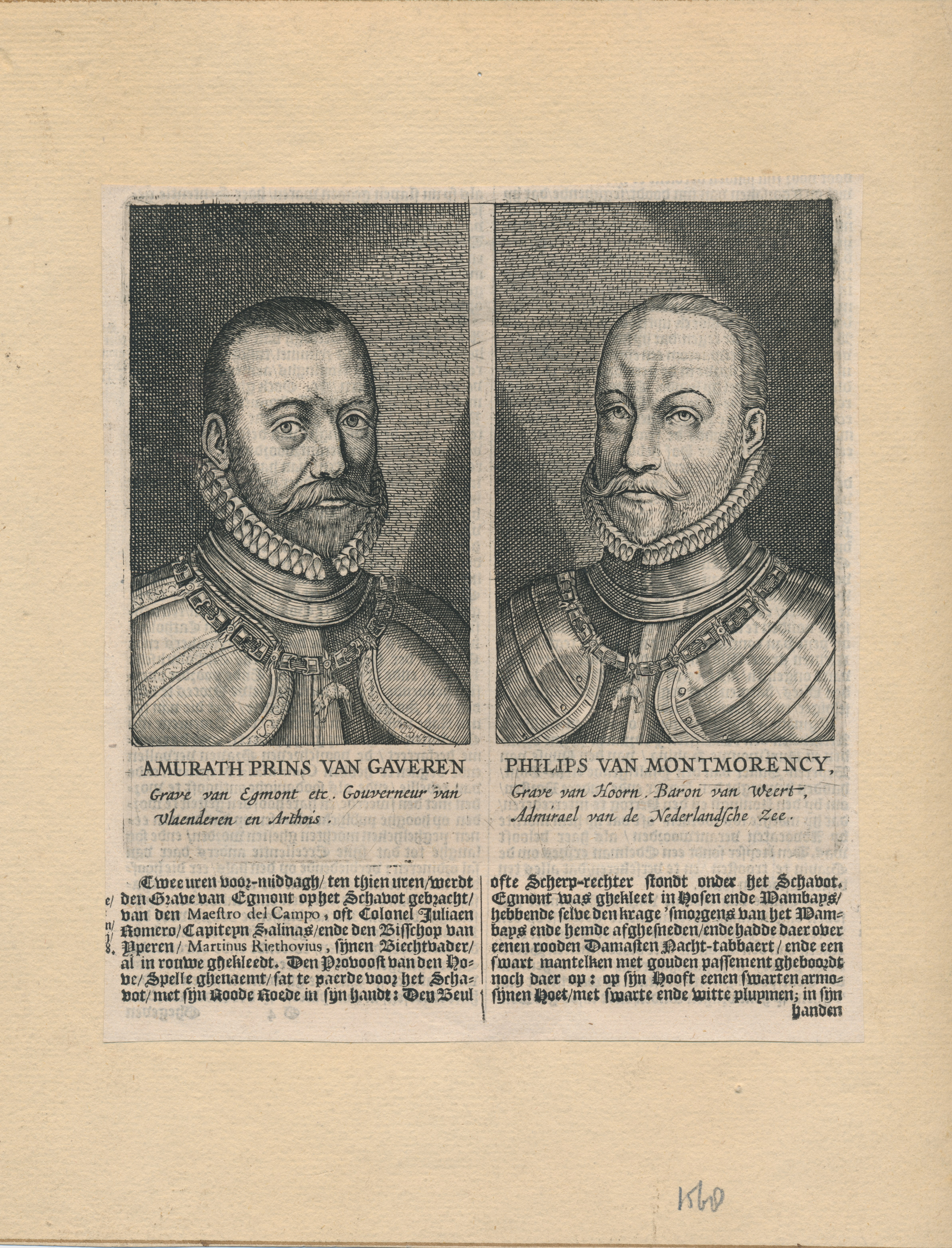 Amurath Prins van Gaveren 1522-1568 & Filips van Montmorency 1524-1568